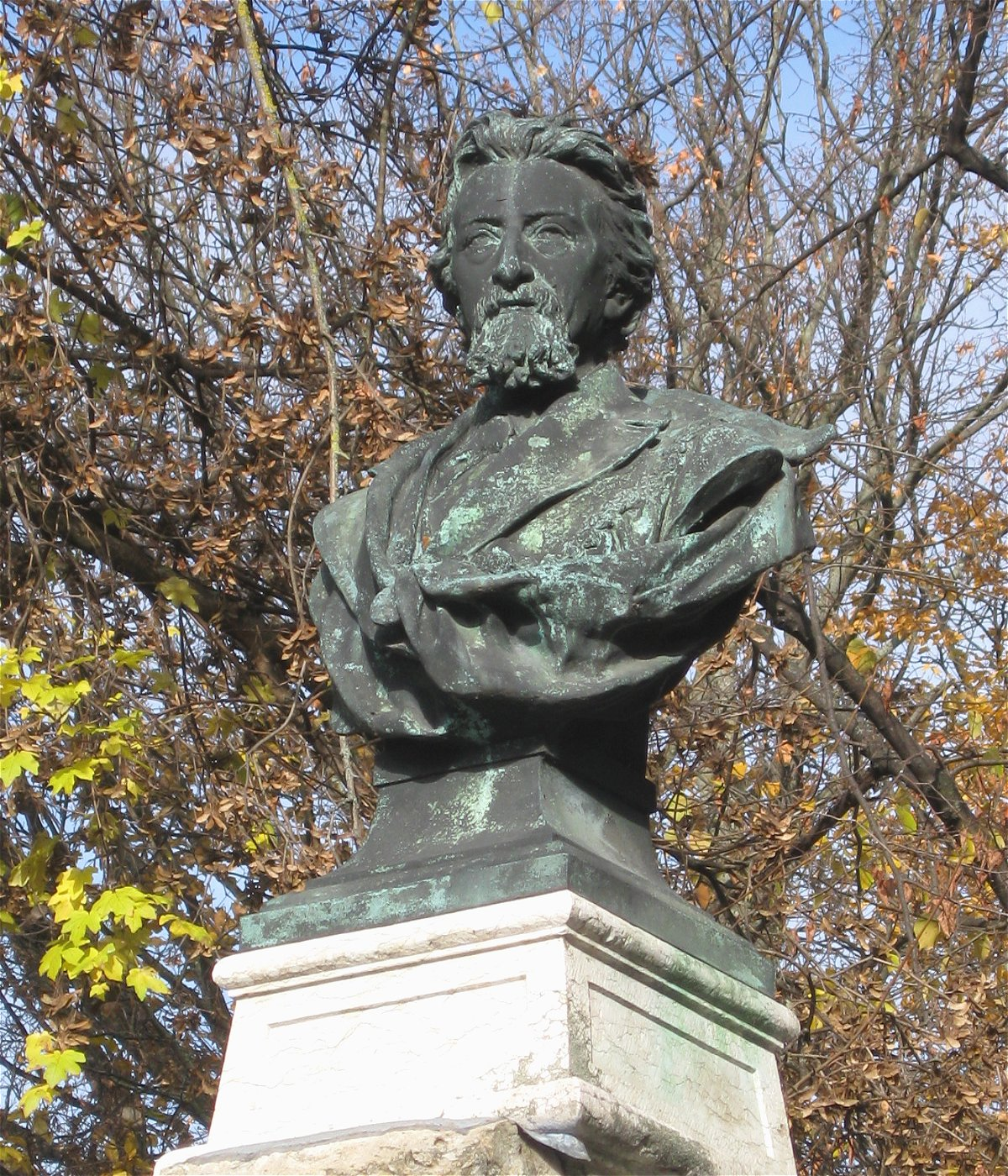 Büste Bürgermeister Alois von Erhardt (1831-1888), Teil eines Brunnens, 1893 von Karl Hocheder d. Ä.